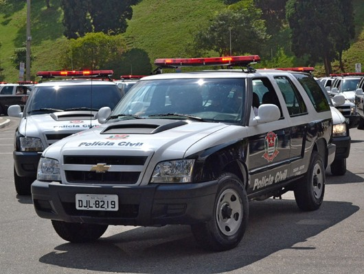 São Paulo State police car